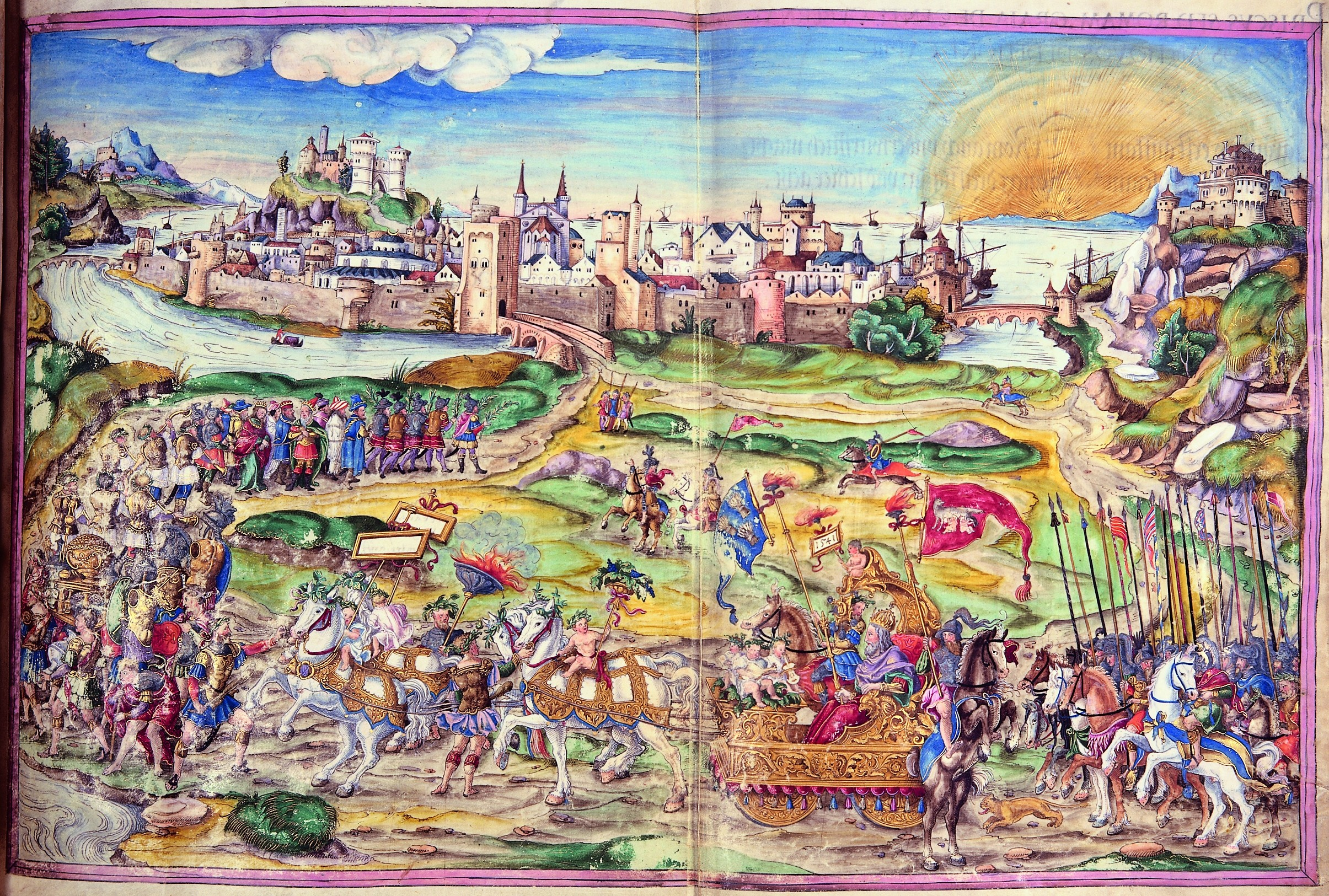 Triumph des Lucius Tarquinius aus Hans Tirols Chronik-Werk, Eton College Library Bd. 1, MS 92, Bl. 49 innen